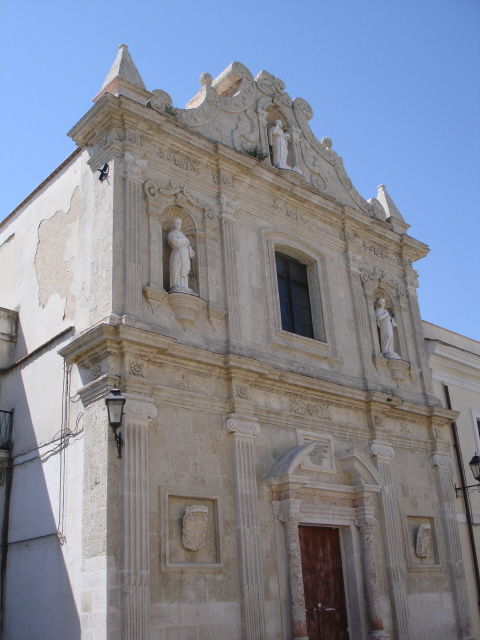 Chiesa di S. Agostino, a Foggia (Puglia)